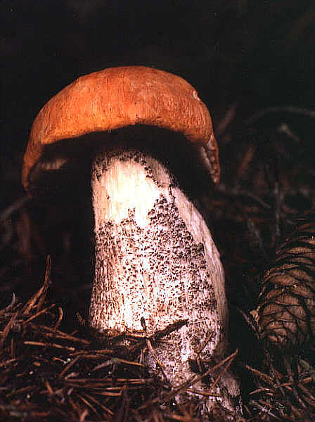 Heiderotkappe (Leccinum versipelle)